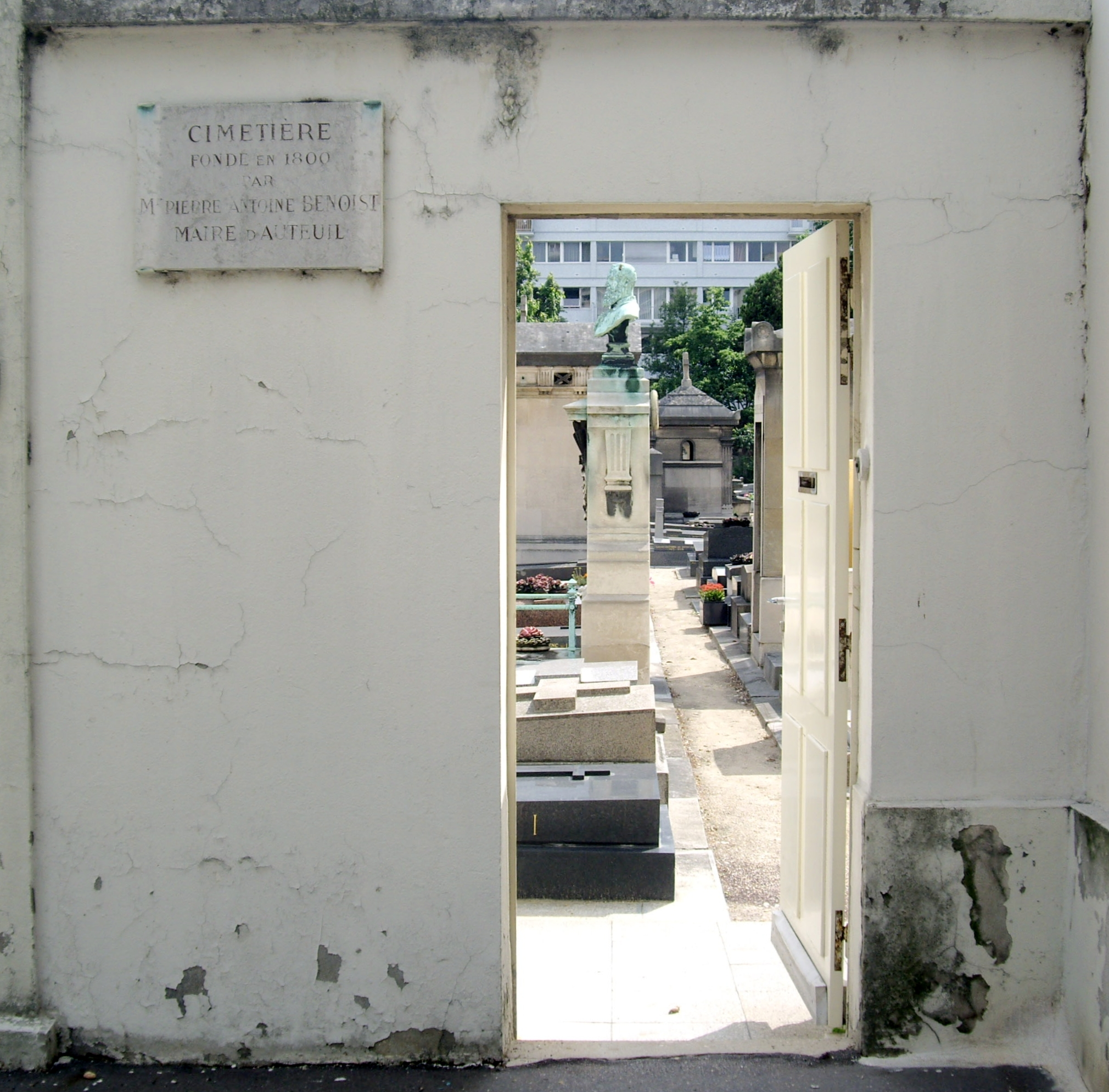 Entrée du cimetière d'Auteuil, 57 rue Claude-Lorrain, Paris 16e. La tombe surmontée d'un buste est celle d'Adolphe Yvon.